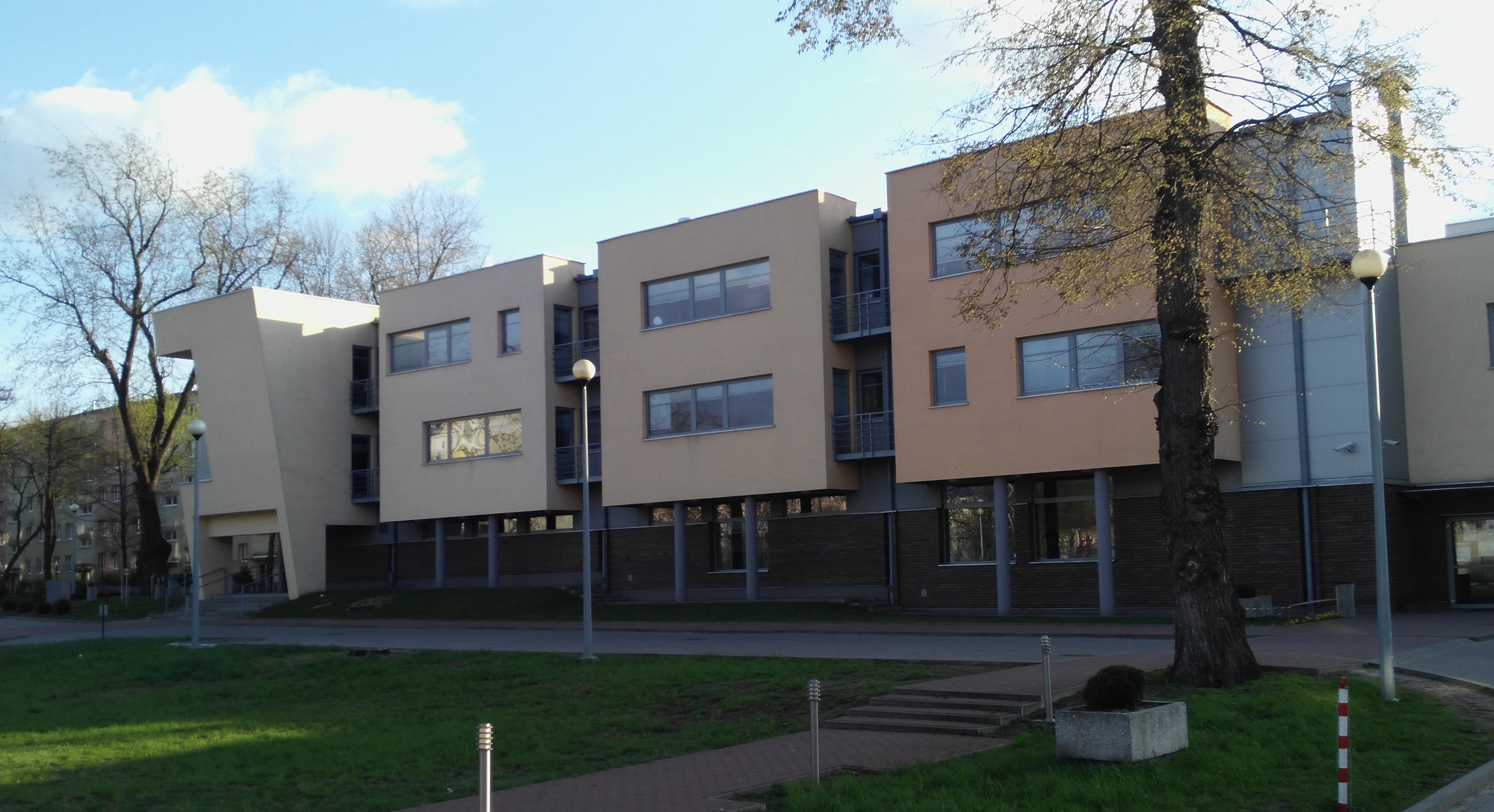 Nowe budynki dydaktyczne tomaszowskiego "Mechanika" (ZSP1) w Tomaszowie Mazowieckim. Widok od ulicy T.Kawki. Kwiecień 2017 roku.